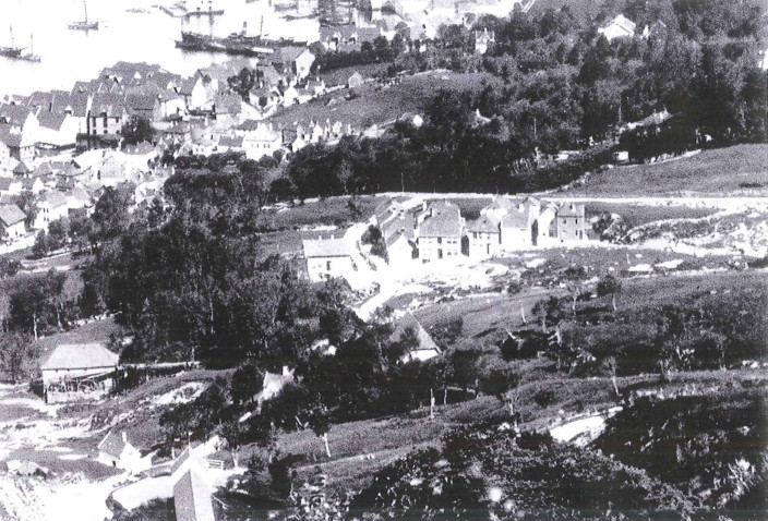 Mulen fotografert fra Fjeldveien/Fjellveien rundt 1882, flere tiår år før Typebyen ble bygget. I venstre billedkant sees en av de fire møllene som på denne tiden lå langs Mulelven. I midten sees Mulegrenden, der mange møllearbeidere hadde sine boliger. Huset nede til venstre er et gammelt husmannshus som i dag har adresse Øvre Sandviksveien 23. Ved siden av sees også enden av en reperbane. I bakgrunnen Christinegården og Sandviken.